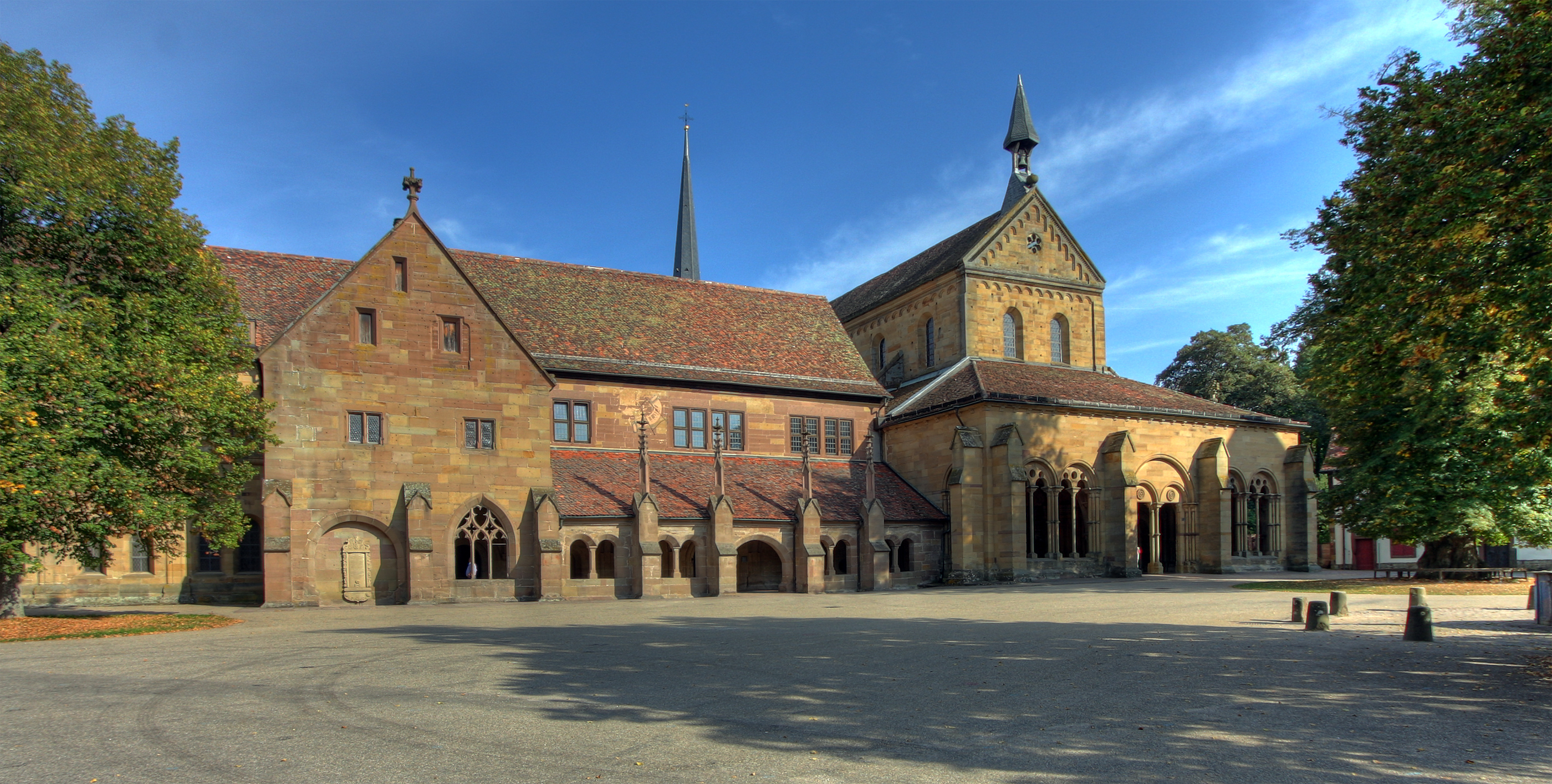 Kloster Maulbronn, Blick auf die Klosterkirche mit Vorhalle („Paradies“)